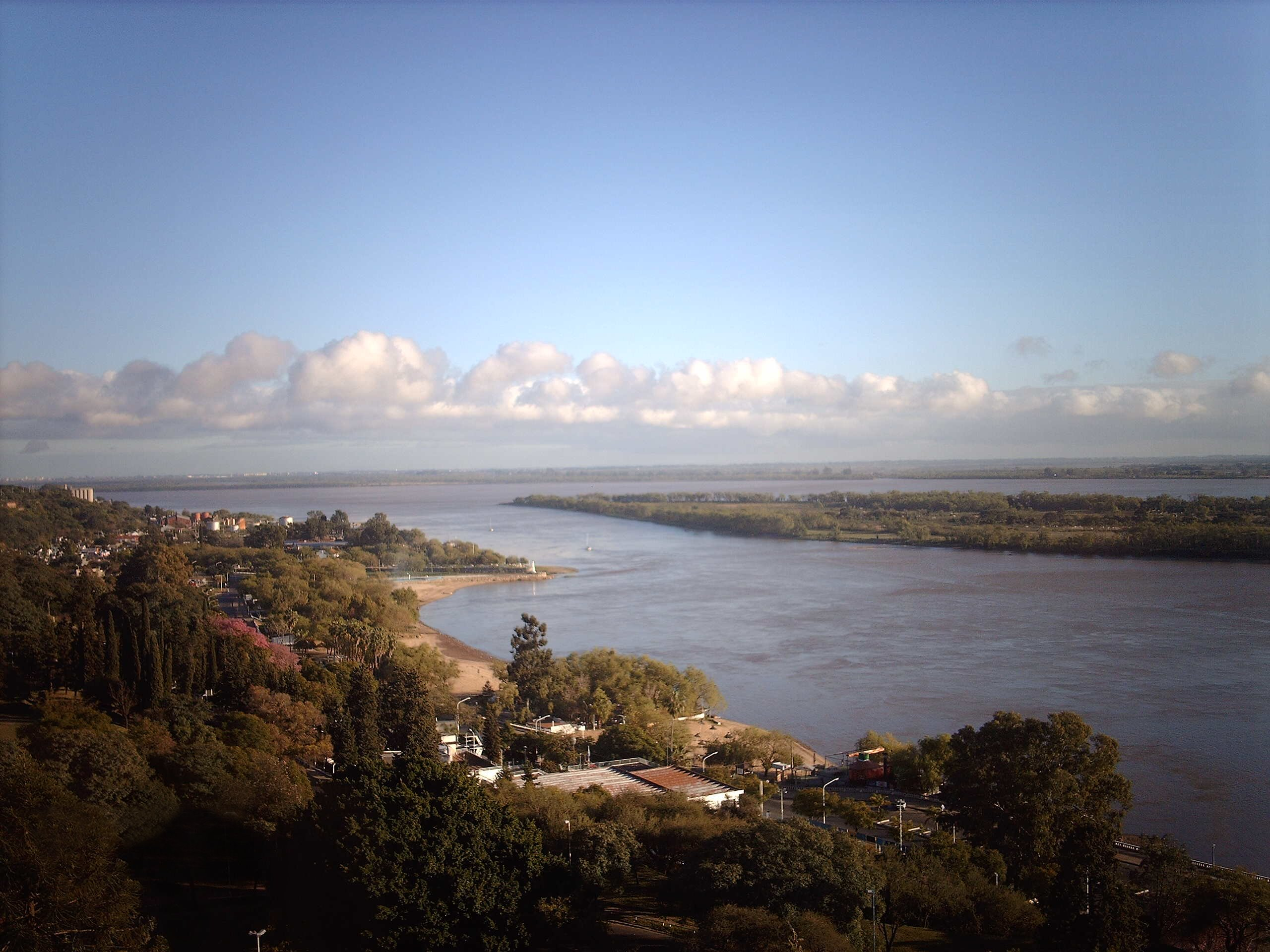 Río Paraná desde la ciudad de Paraná, Entre Ríos, Argentina.